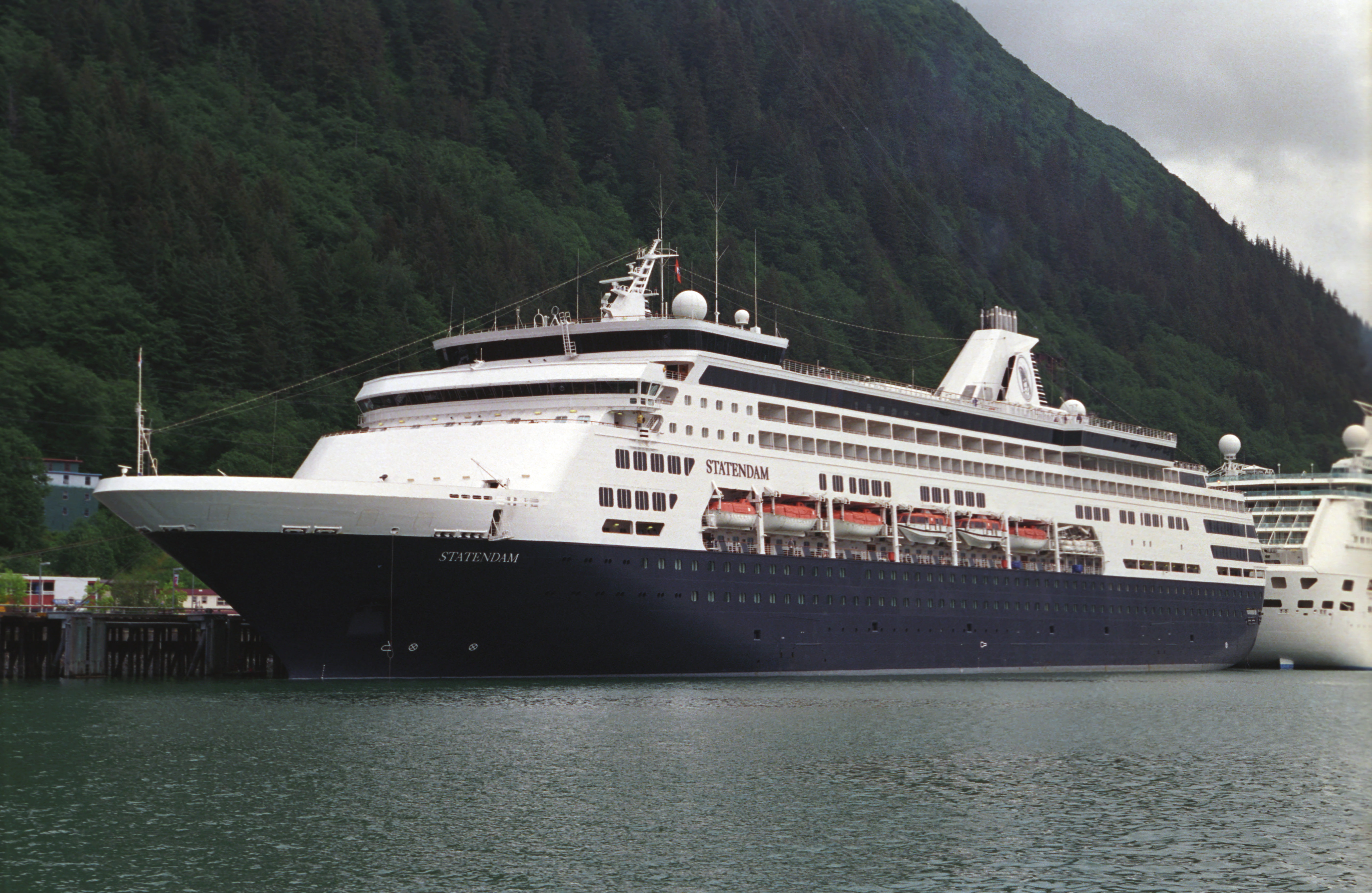 MS Statendam